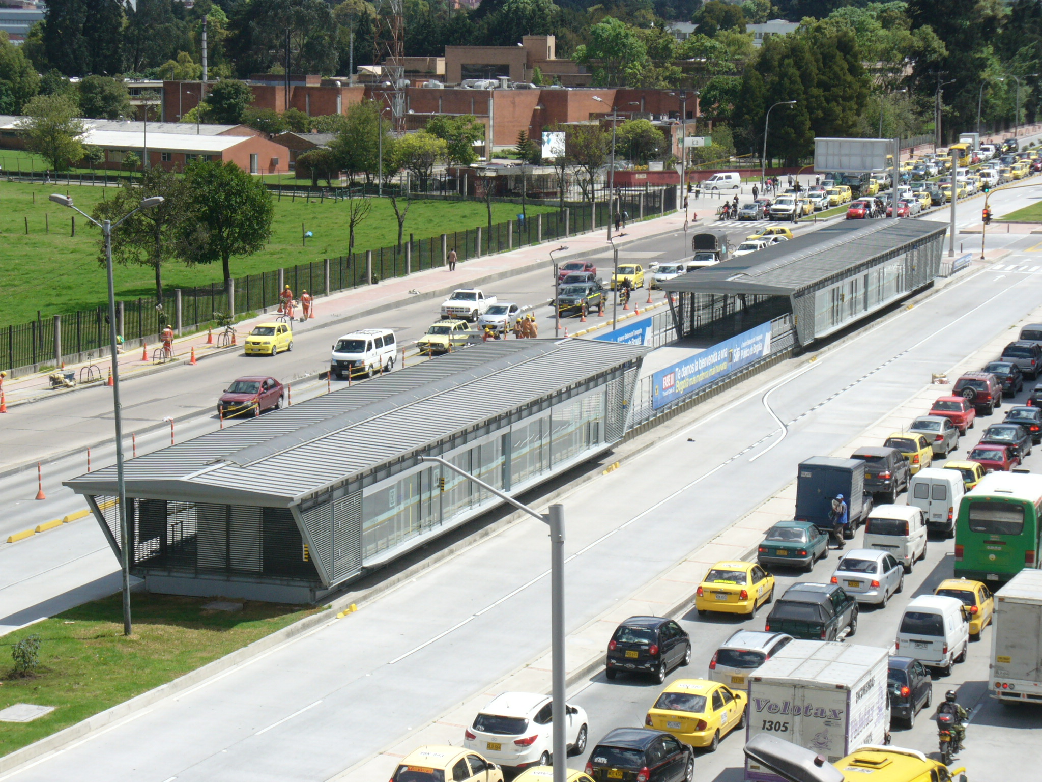 Estación Corferias del sistema Transmilenio.